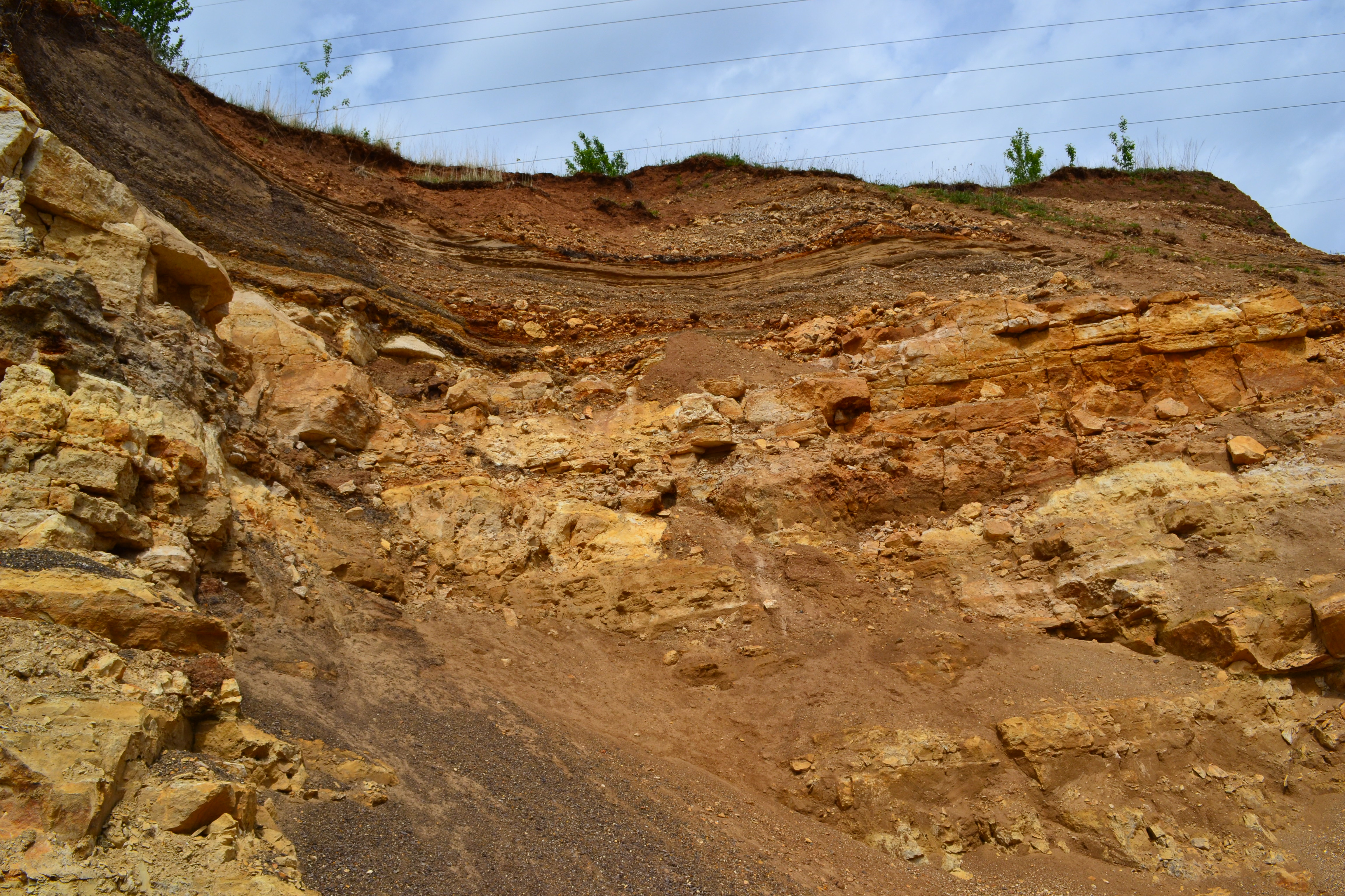 Известняковый карьер в Подмосковье (д. Никитское, Домодедовский район)